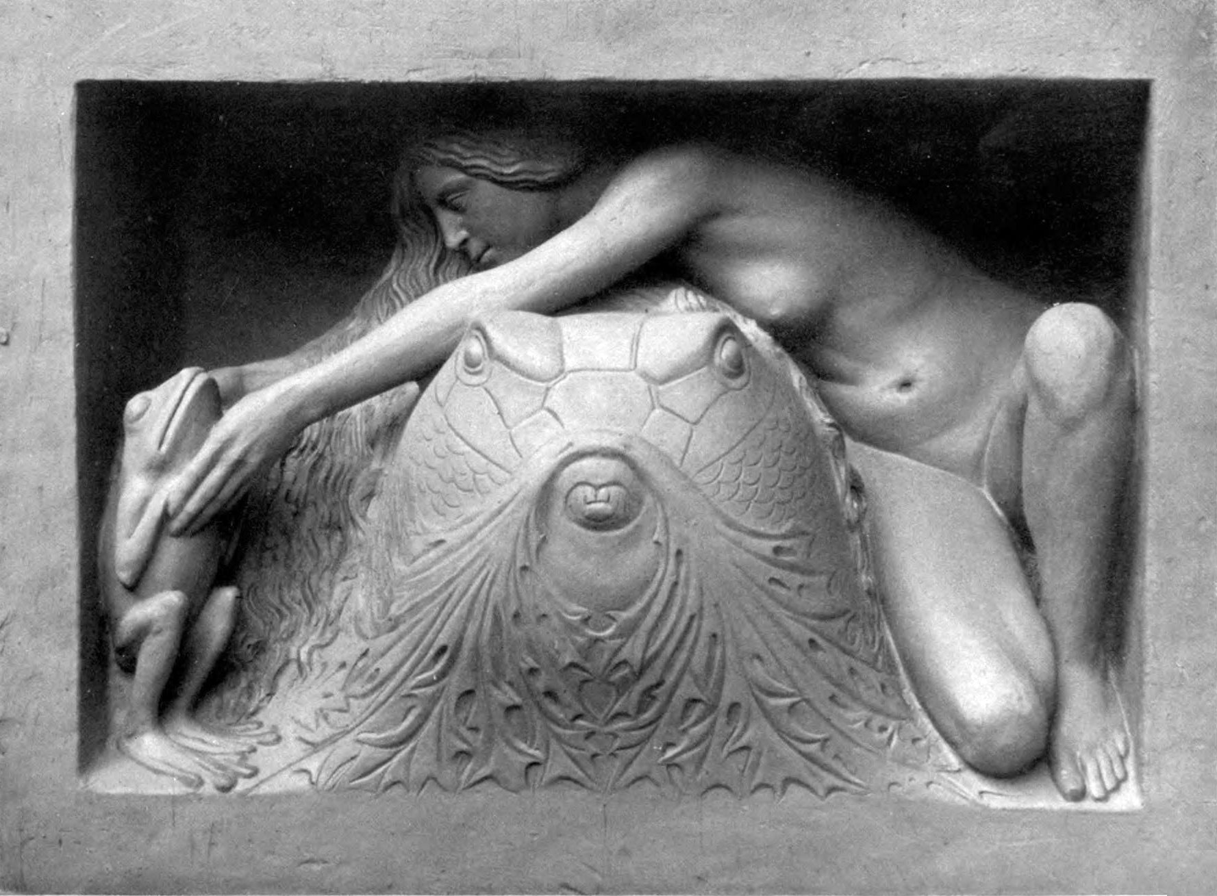 Ignatius Taschner (1871-1913): Relief vom Gustav-Freytag brunnen, 1907, in Breslau